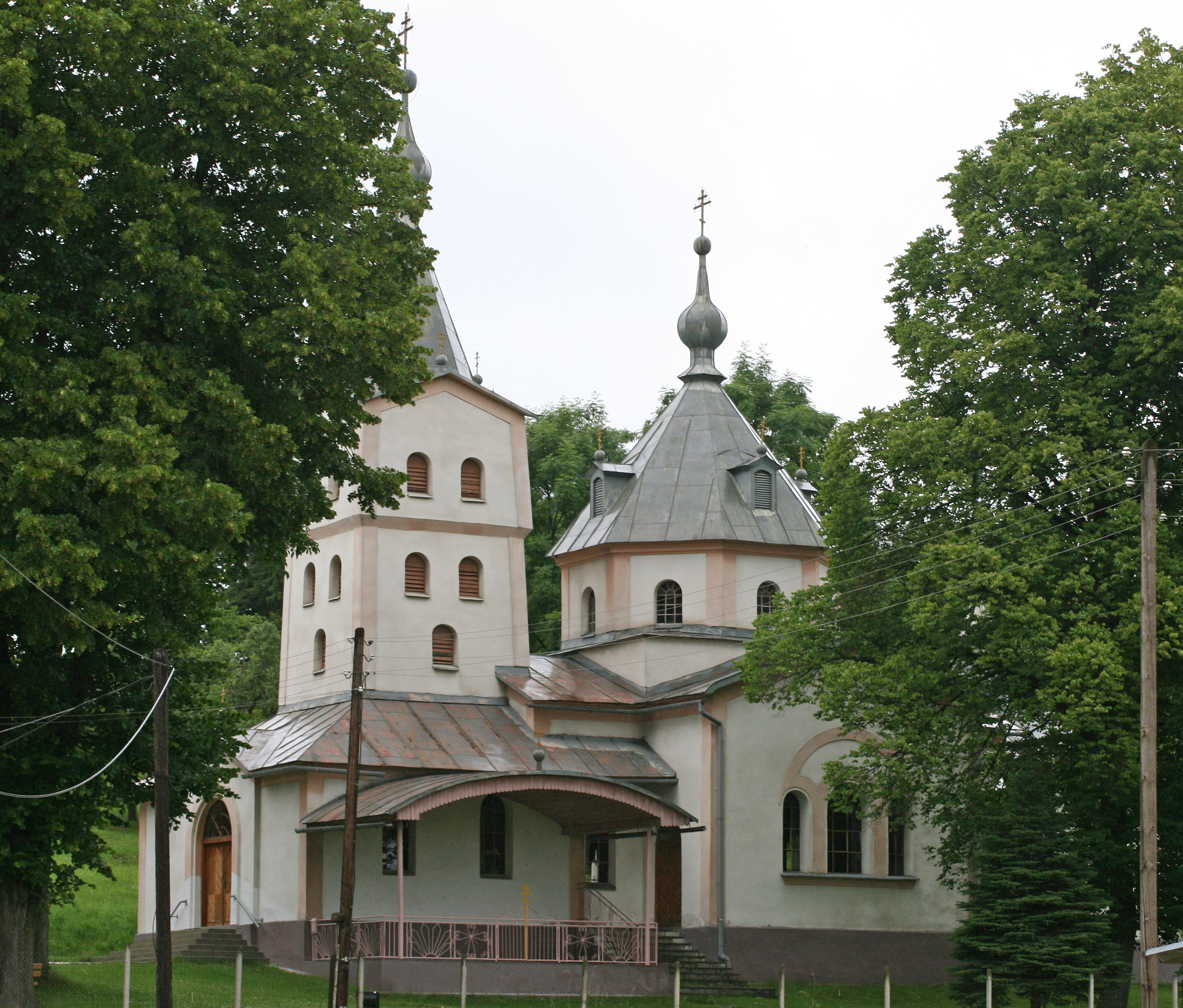 Pravoslávna cerkov v Ladomirovej